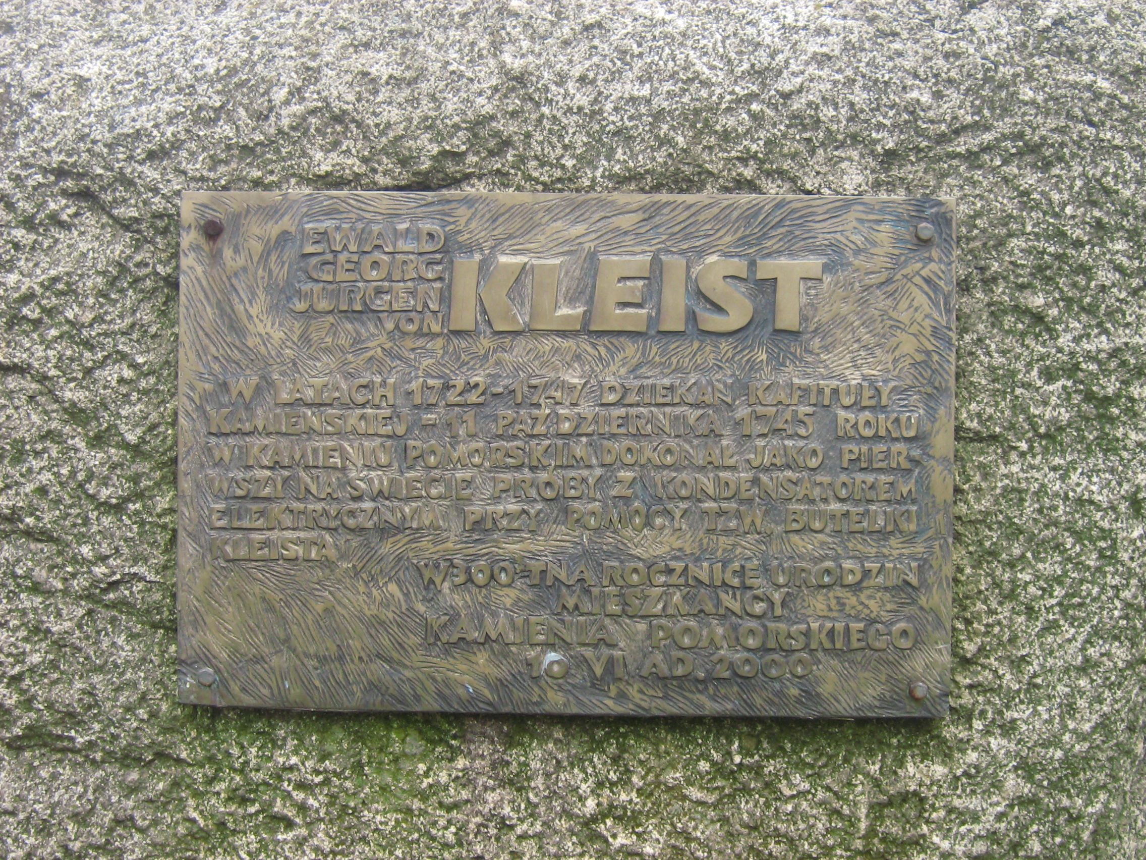 "Ewald Georg Jurgen von Kleist W latach 1722-1747 dziekan kapituły kamieńskiej - 11 października 1745 roku w Kamieniu Pomorskim dokonał jako pierwszy na świecie próby z kondensatorem elektrycznym przy pomocy tzw. butelki kleista. W 300-tną rocznicę urodzin mieszkańcy Kamienia Pomorskiego 10 VI 2000"